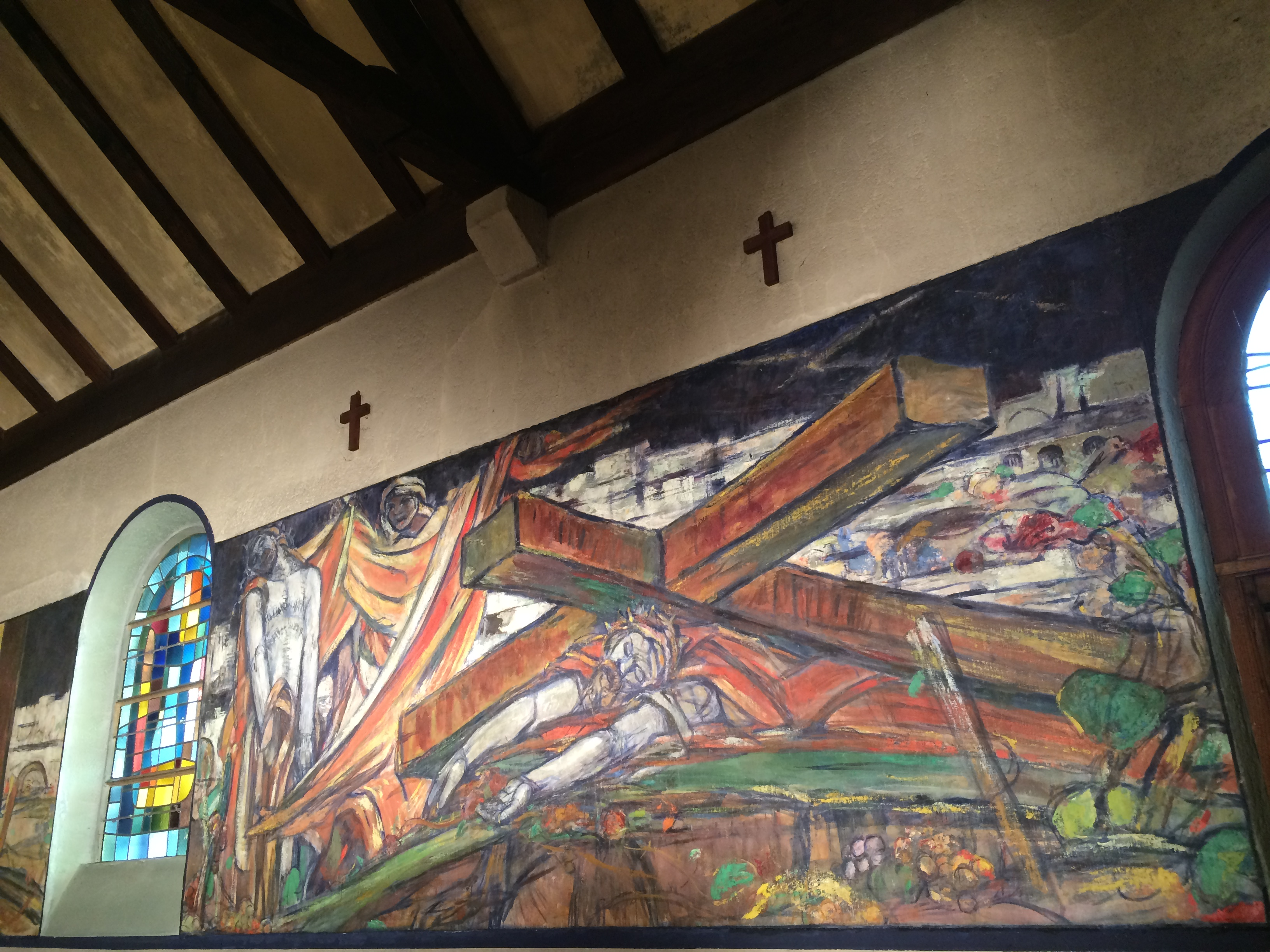 Extrait du Chemin de croix œuvre de George Desvallières dans l'église Sainte-Barbe de Wittenheim